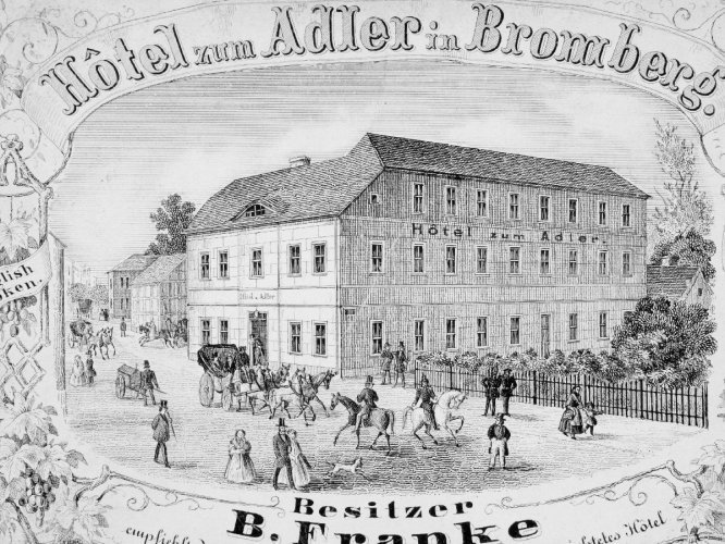 Reklama hotelu "Zum Adler" (późniejszy "Pod Orłem") w Bydgoszczy